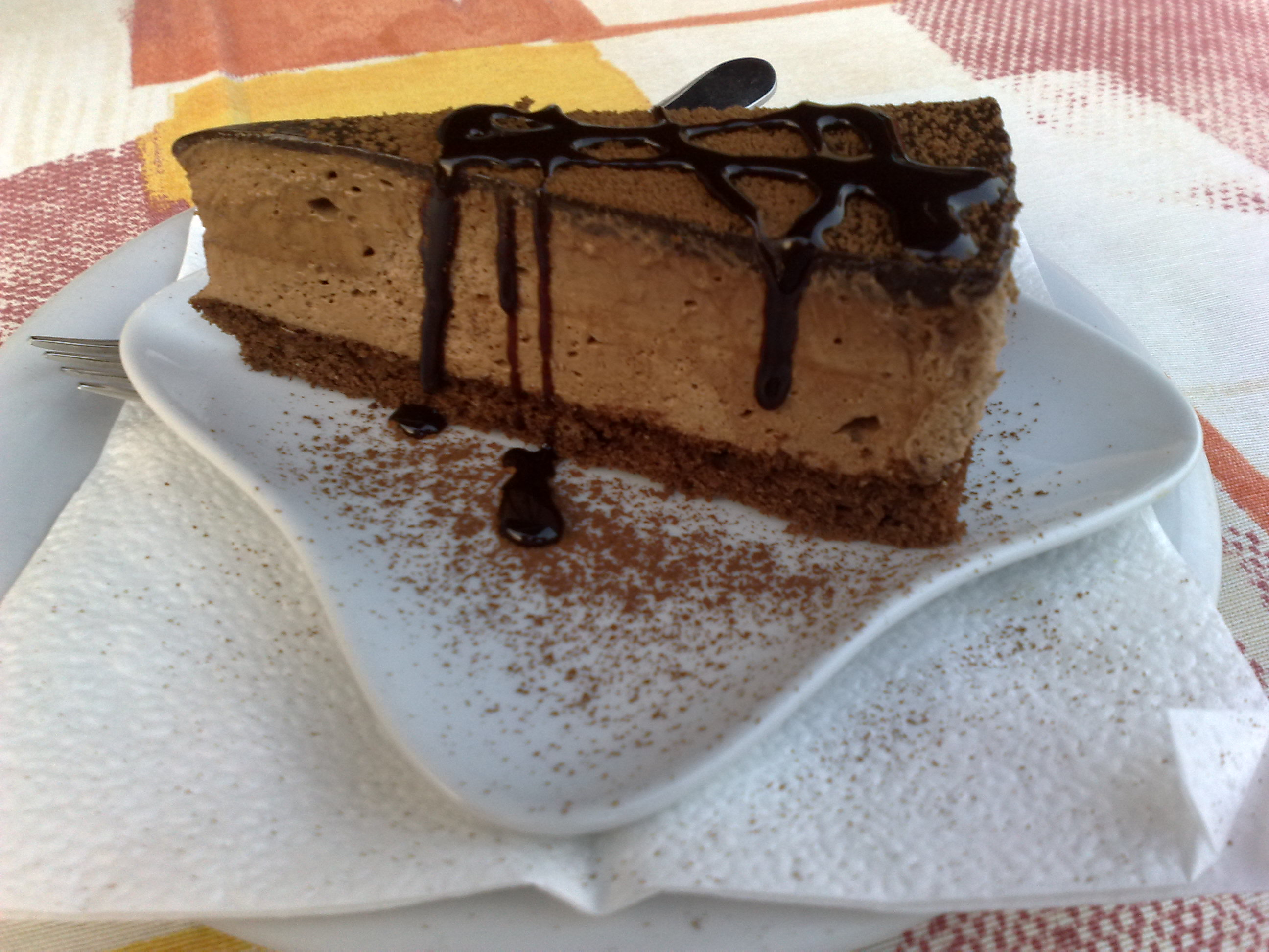 Rigojanči, kolač fotografisan na jednom od splavova na Savi u Beogradu